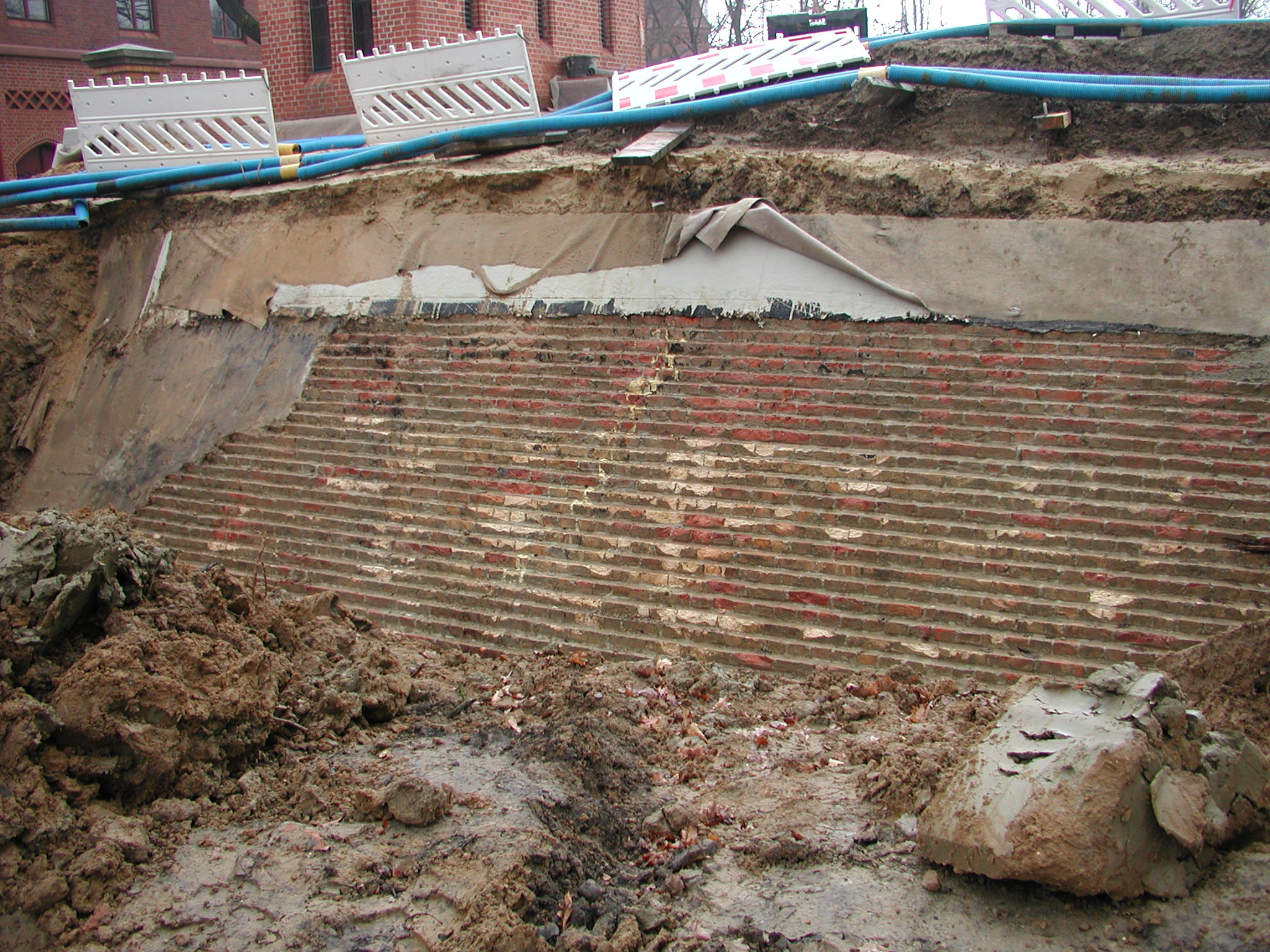 Berlin, Lichtenberg, Landsberger Allee, Wasser-Zwischenpumpwerk: Bassin, Außenmauer